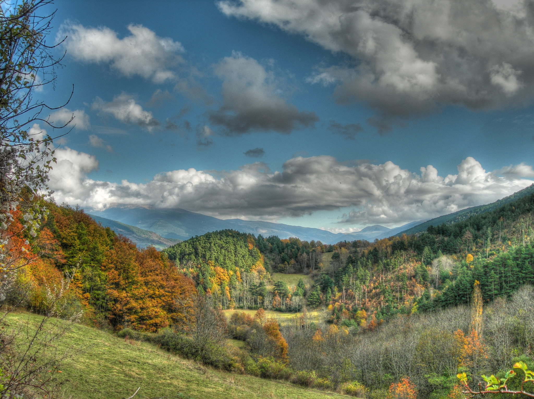 Paisaje otoñal, comarca del Alt Berguedà, Barcelona, Cataluña, España